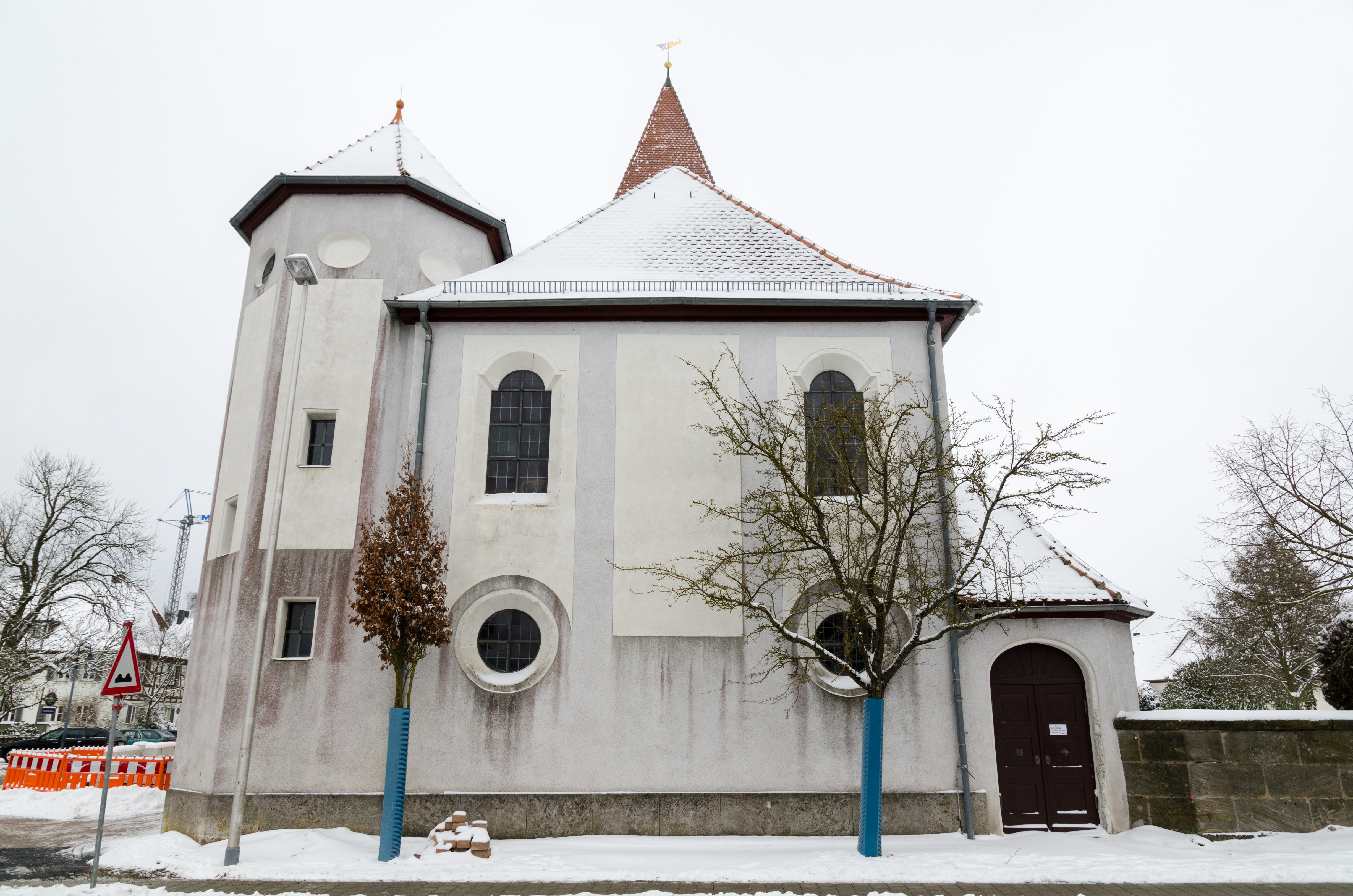 Evang-Luth. Kirche St. Laurentius in Elpersdorf